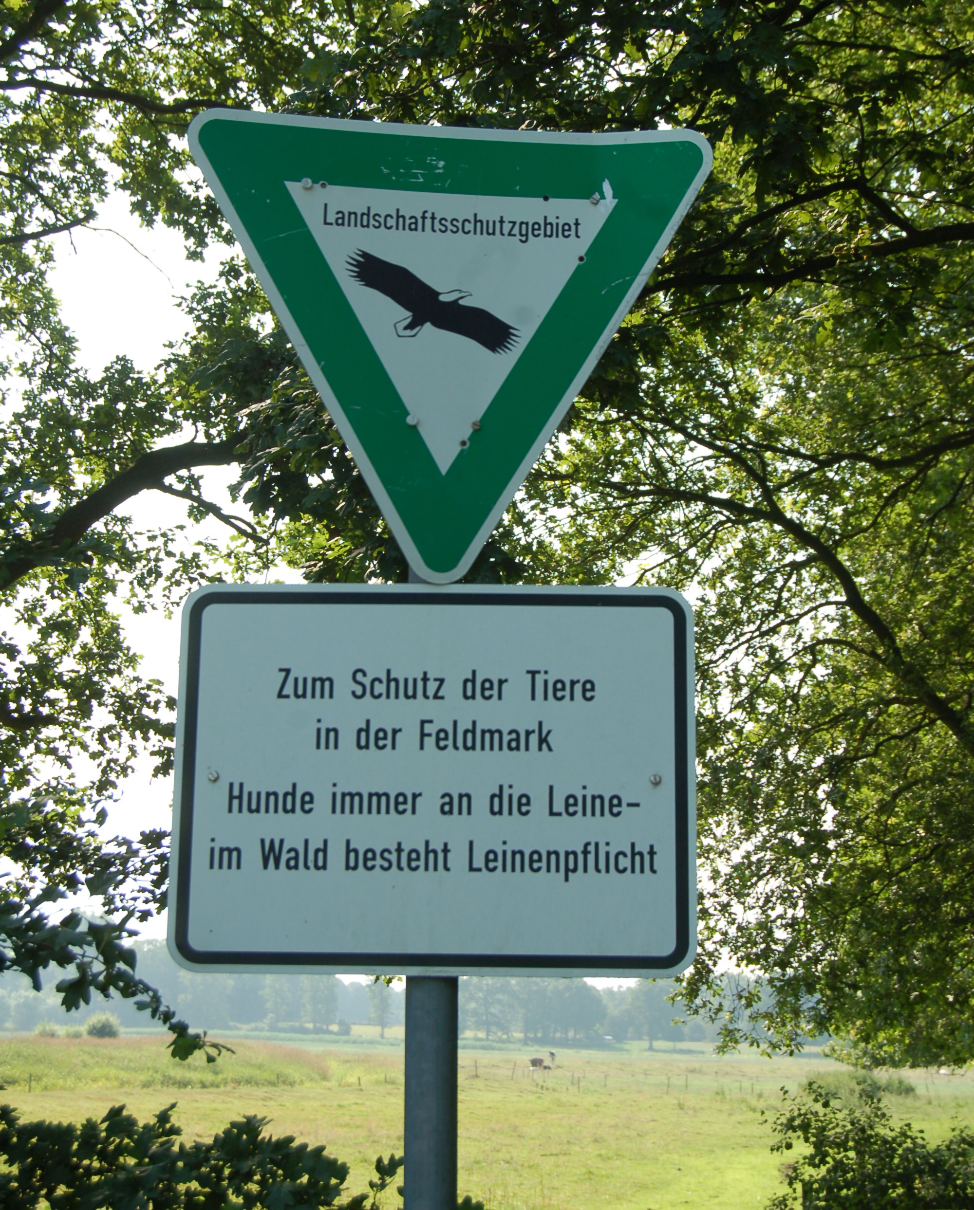 Hinweisschild am Rand des ehemaligen Pinnautals in Uetersen, Landschaftsschutzgebiet „Mittlere Pinnau“